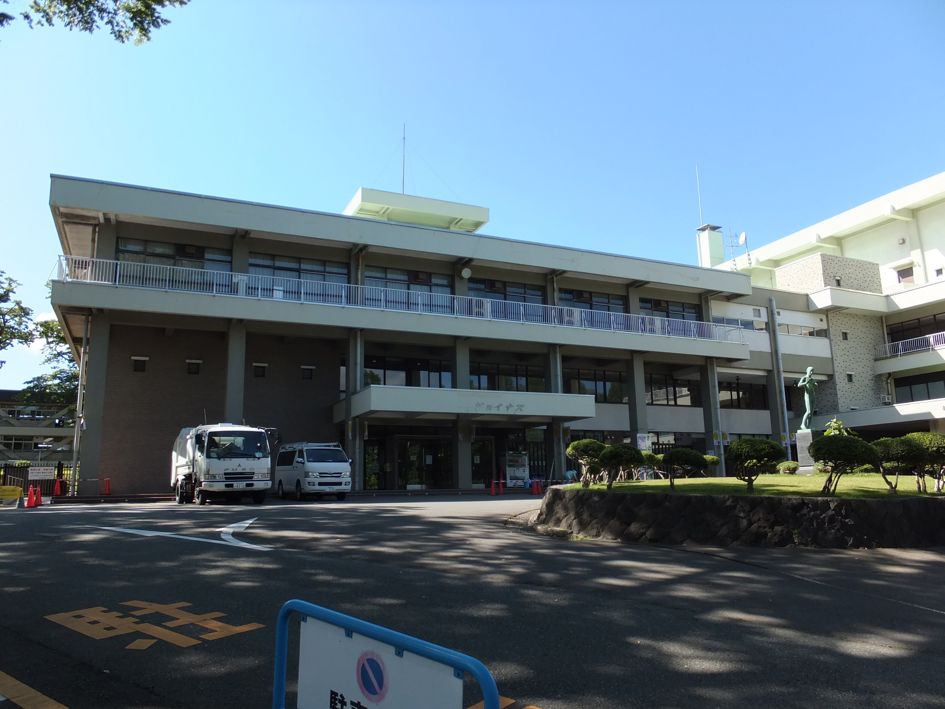 秋田県民会館分館「ジョイナス」。1961年に秋田県立図書館として建てられ、その後1993年に図書館が山王中島町に移転したことから、県民会館の分館へと改修された。